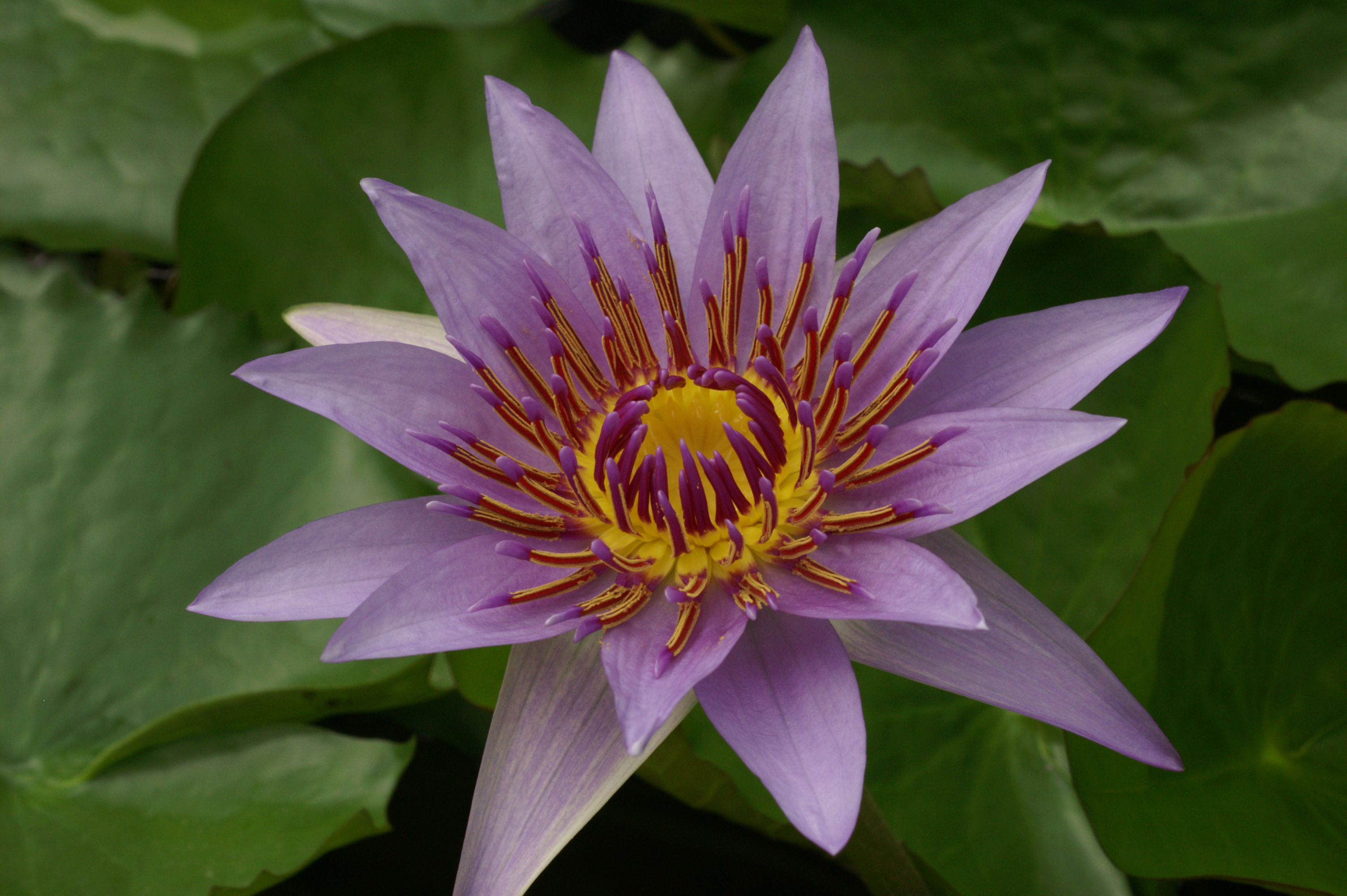 Blüte der Bunten Seerose (Nymphaea colorata im Botanischen Garten, Berlin.